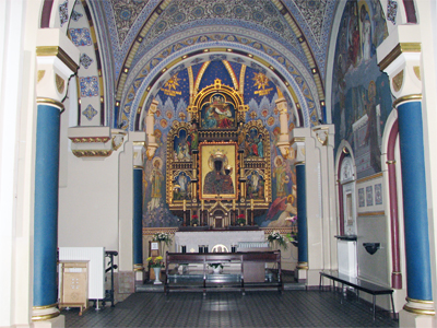 Chapel of Our Lady of Czestochowa, Basilica in Katowice Panewniki, Poland.